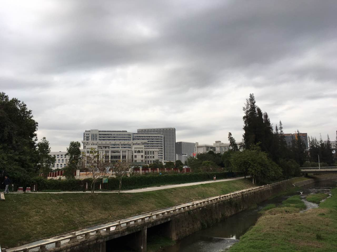 南开大学深圳金融工程学院旧址（现深圳大学附属医院）